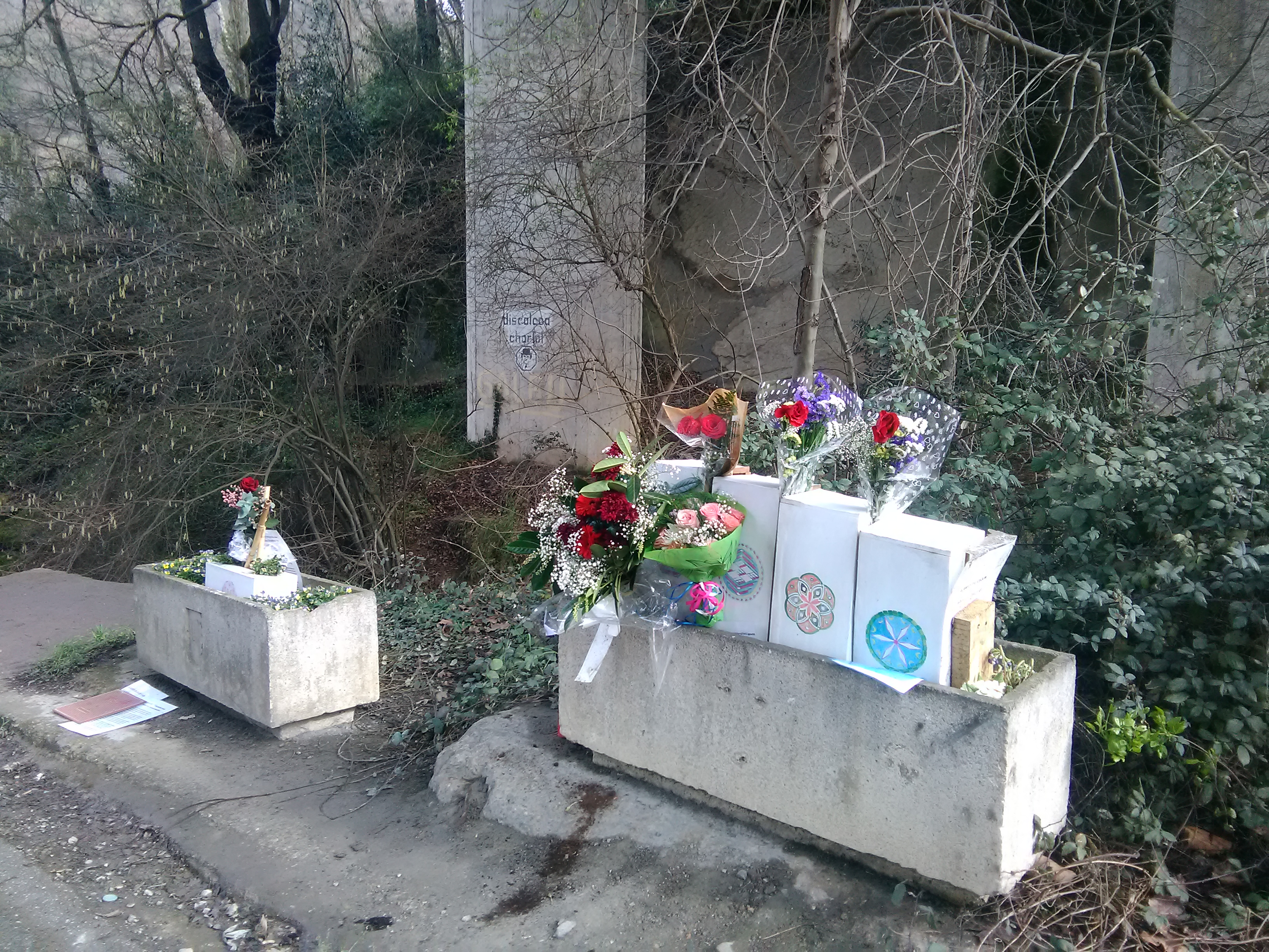 2020ko otsailaren 6an, Zaldibarko Verter Recycling zabortegian izandako luizietan desagertutako bi beharginen senideek ezarritako eskaintzak